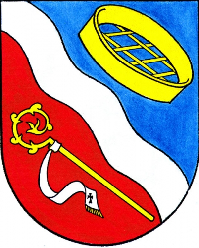 znak, Rokytnice nad Rokytnou, okres Třebíč